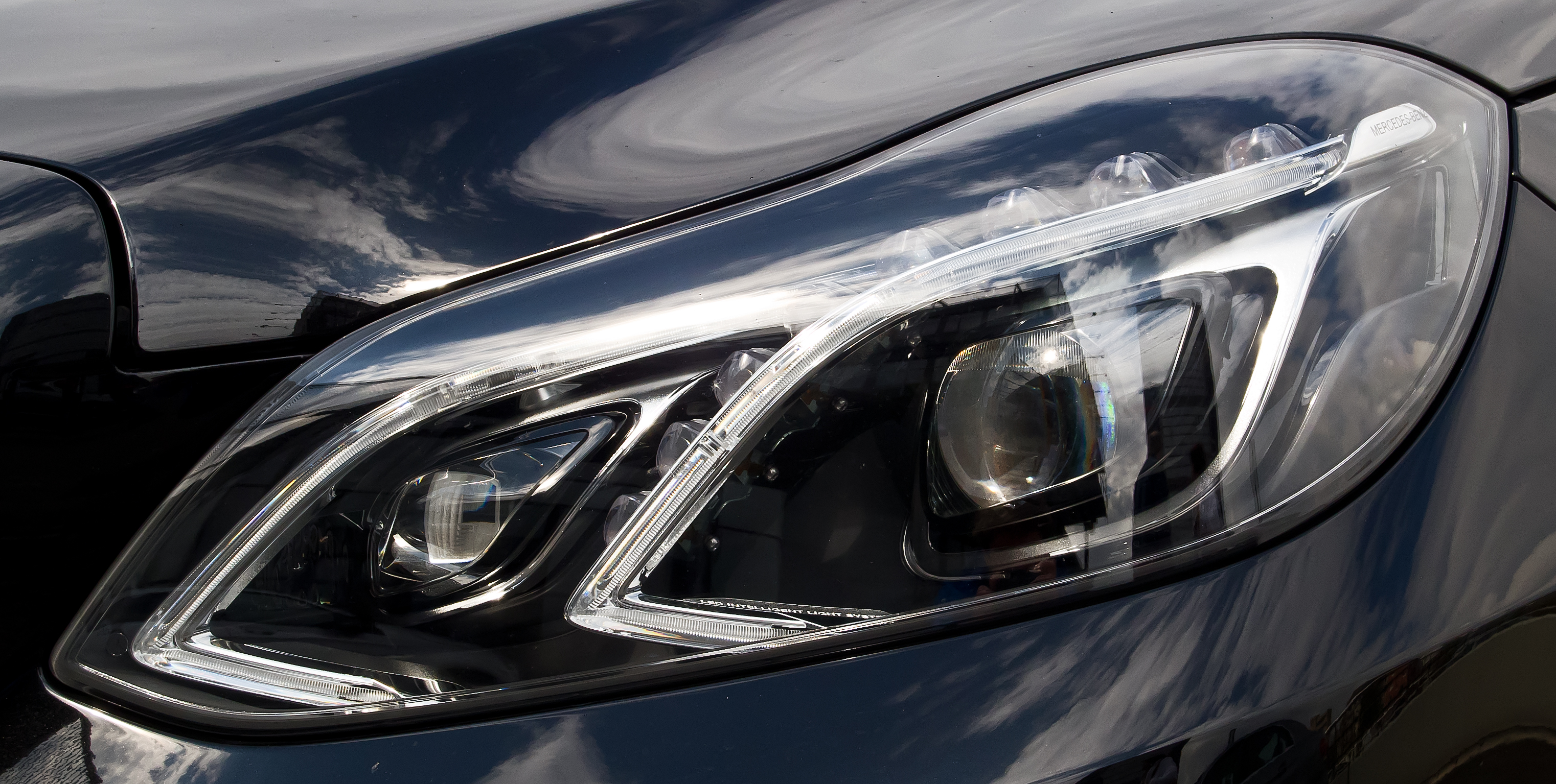 Mercedes-Benz E 220 CDI Avantgarde (W 212, Facelift)